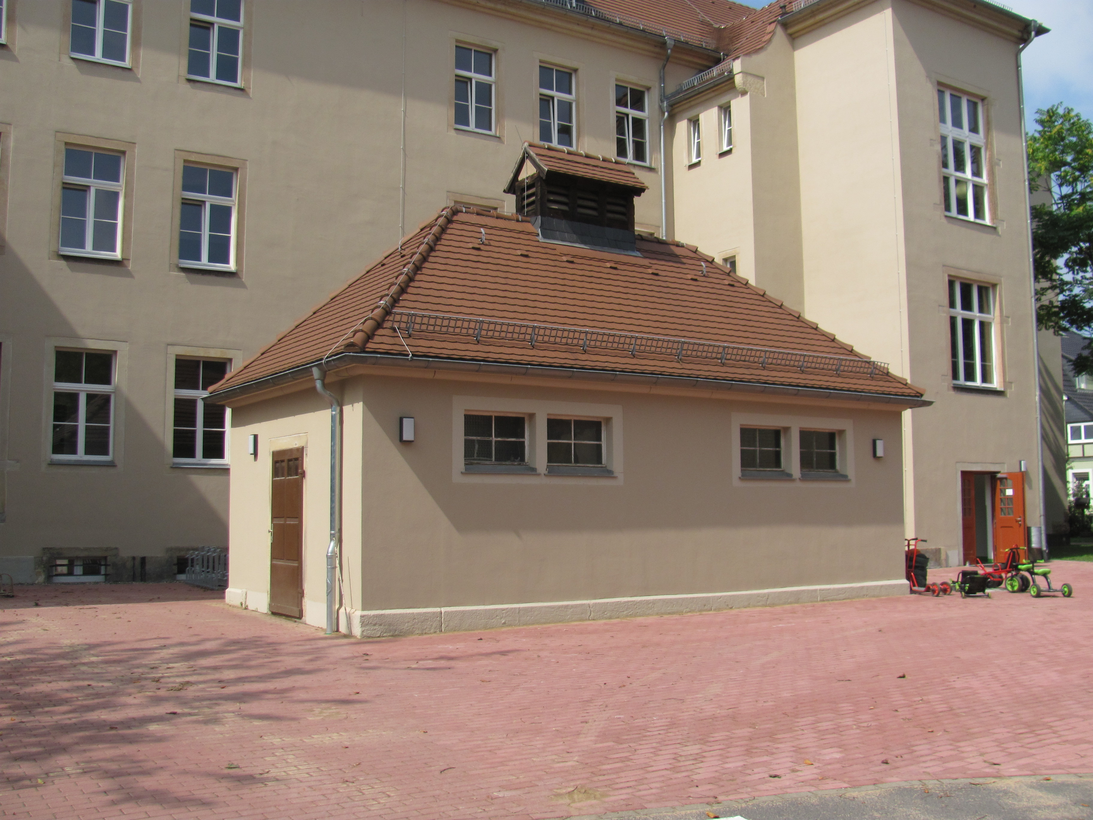 Radebeul-Naundorf Schule